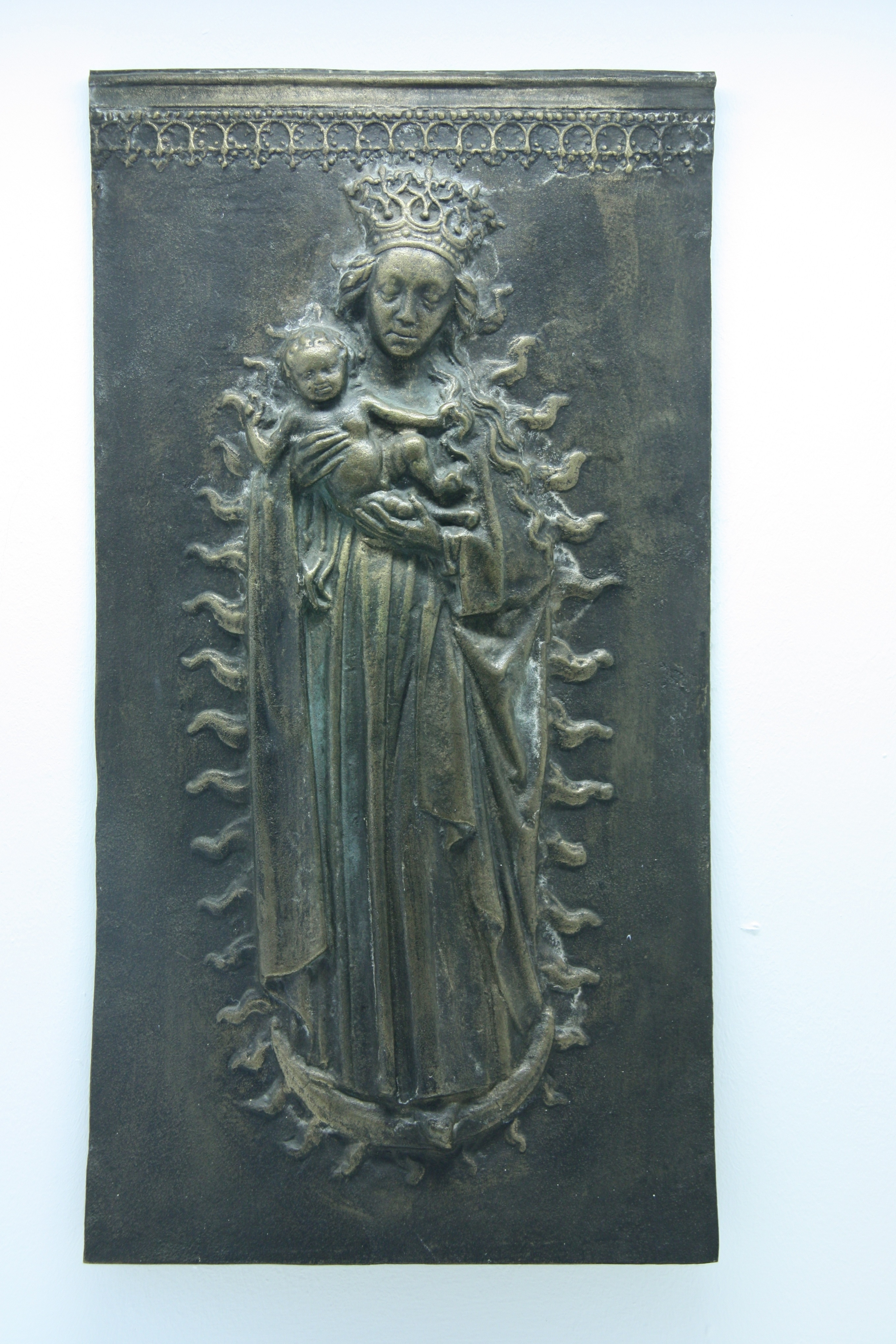 Abguss der Seite der Celsa-Glocke aus dem alten Mariendom. Aus der Ausstellung des Museums für hamburgische Geschichte.